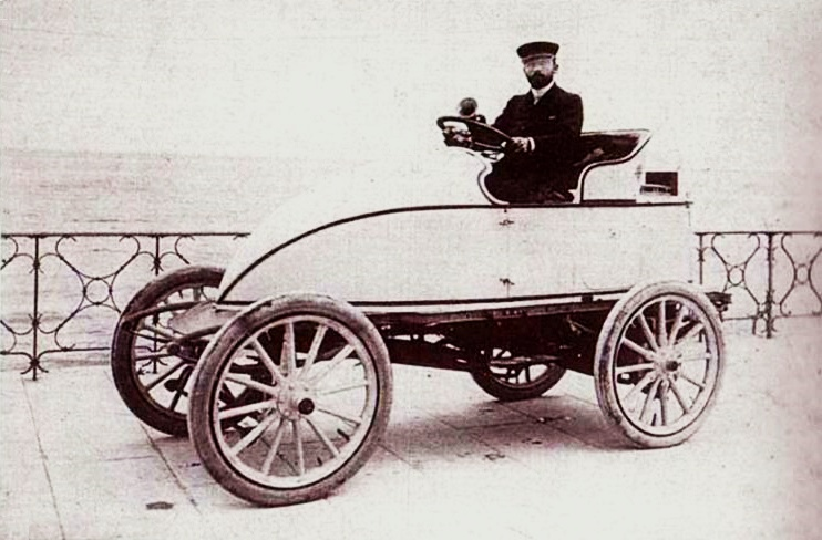 Léon Serpollet le 13 avril 1902, sur Gardner-Serpollet Œuf de Pâques (promenade des anglais) : première voiture à dépasser les 120km/h, entre les mains de Léon Serpollet - La Vie au Plain Air du 23 février 1906, page 145.